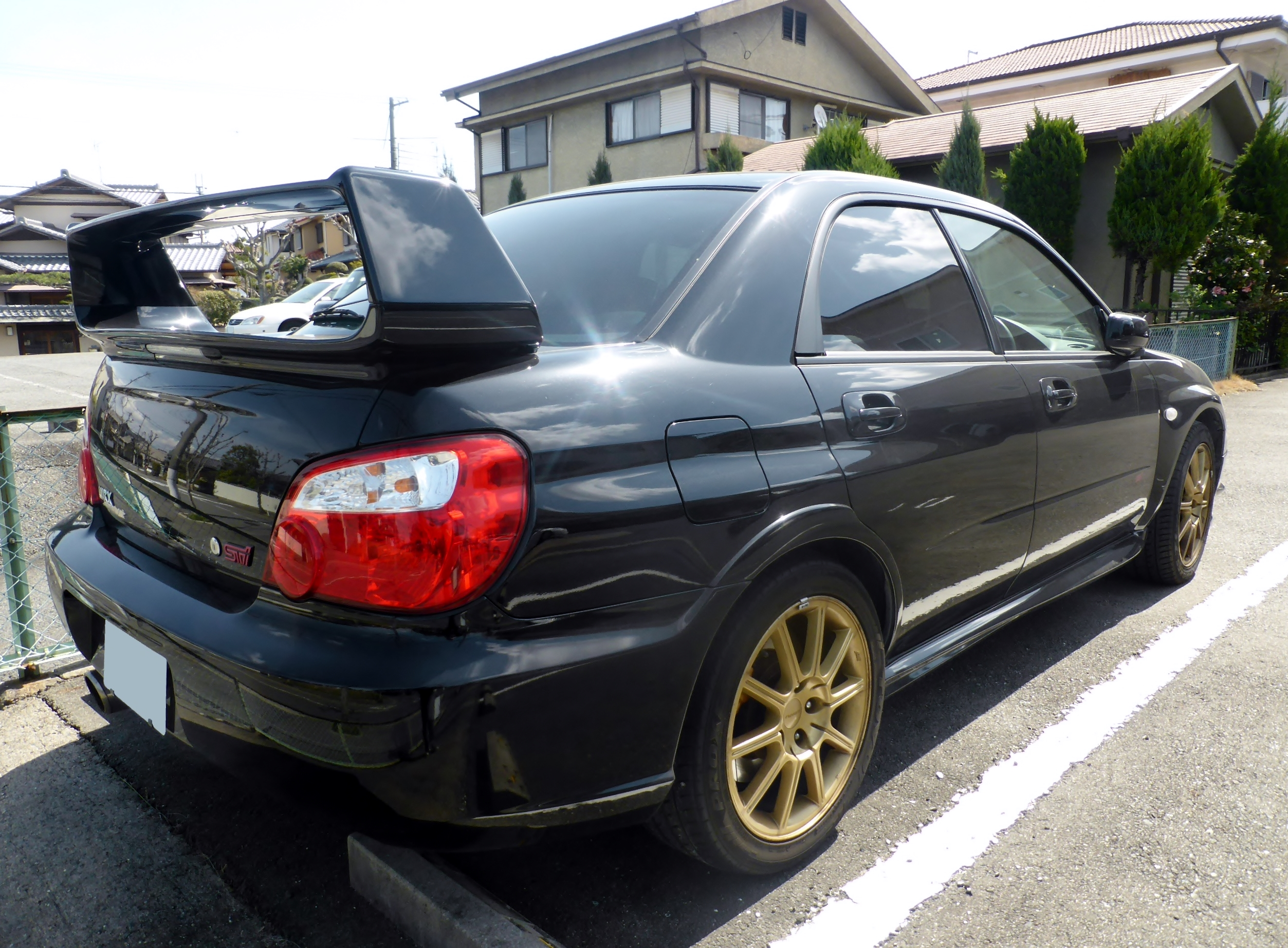 黒いGDB型スバル・インプレッサWRX STiをリアから撮影。